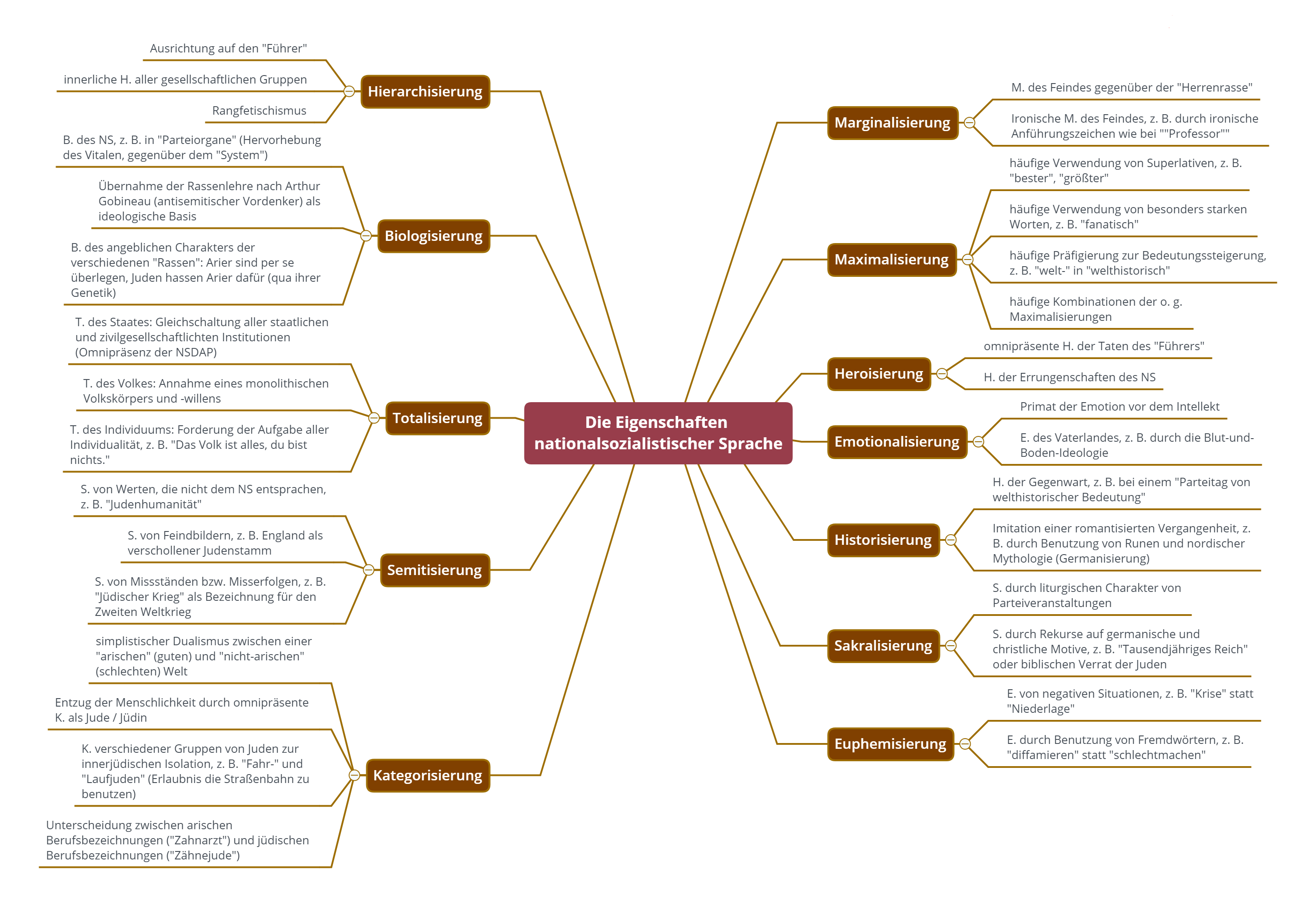 Kategorisiertes Abstract von Victor Klemperers "LTI - Notizbuch eines Philologen" zur Sprache des Dritten Reiches